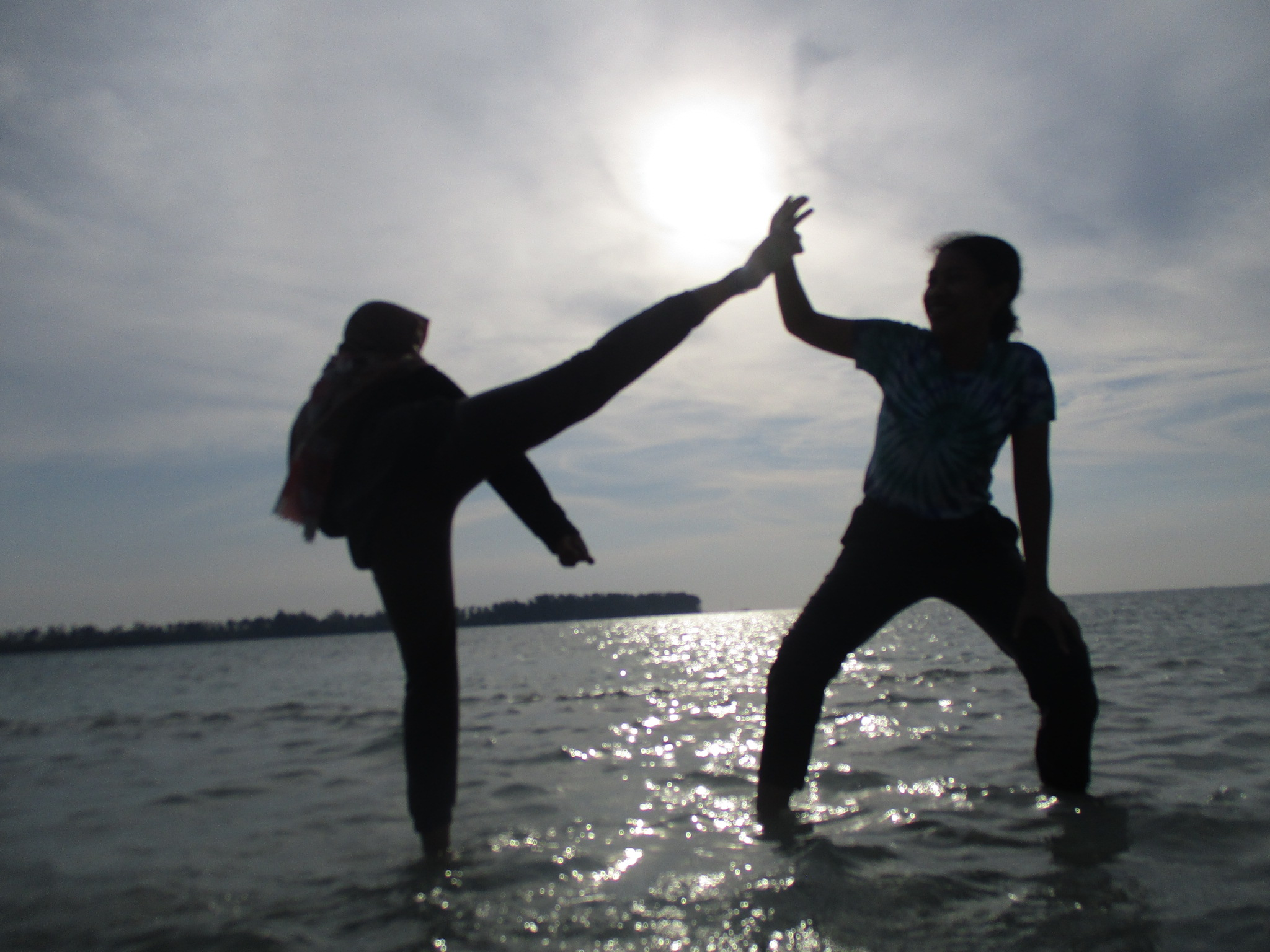 berlatih tendangan pencak silat di pantai gosong kuntilanak di sore hari